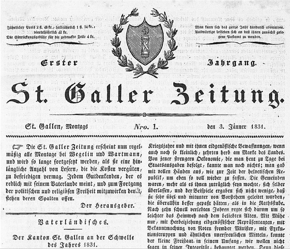 Erste Seite der ersten Nummer der St. Galler Zeitung (Schweiz), 3. Januar 1831